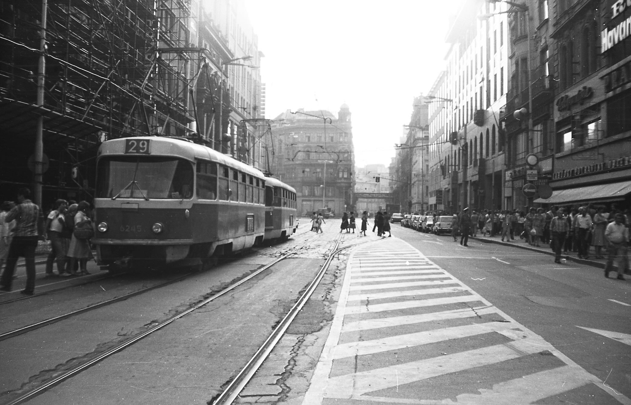 Praha, Nové Město a Staré Město, ulice Na příkopě, pohled přes Můstek k ulici 28. října.